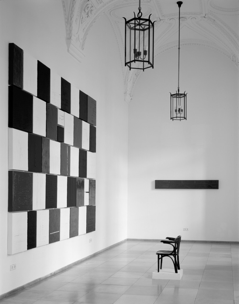 "stop-over/cross-over", Rauminstallation in der Residenz München. 320 x 380 cm, 42 Streetprints auf Leinwand